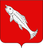 de gueules à un poisson d'argent posé en bande.